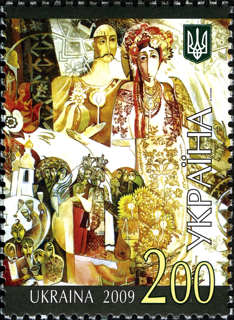 Поштова марка України "Весільні пісні"